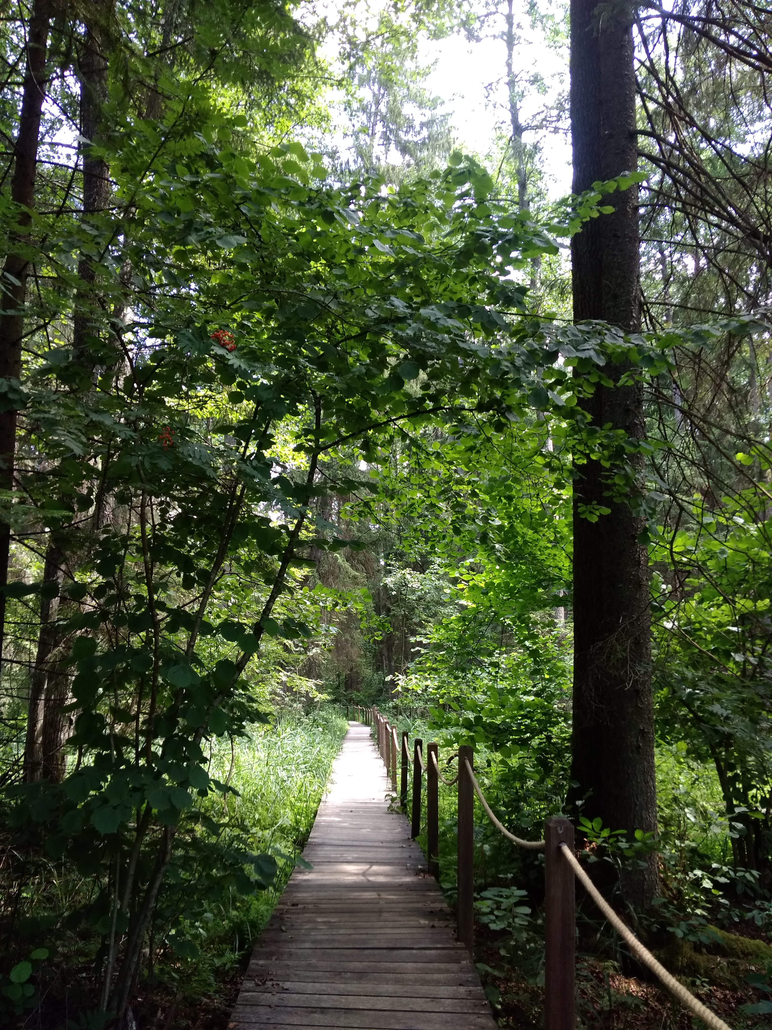 Kładka „Żebra Żubra” w Puszvzy Białowieskiej